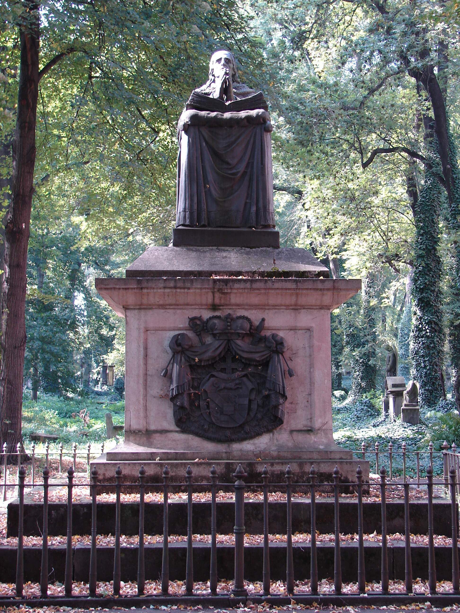 Kovová socha klečícího Leopolda Leonharda Thuna nacházející se na Malostranském hřbitově v Praze 5 Košířích